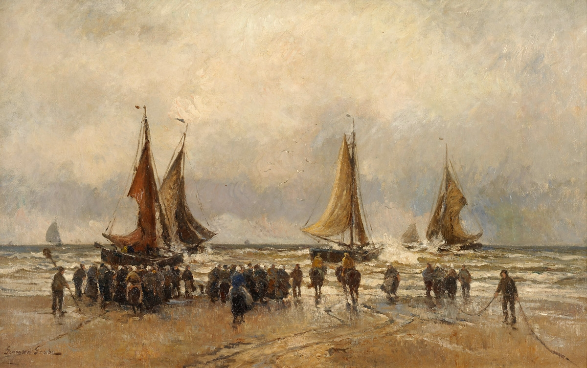 Anlandung der Fischerboote. Signiert. Öl auf Leinwand. 80 x 128 cm.